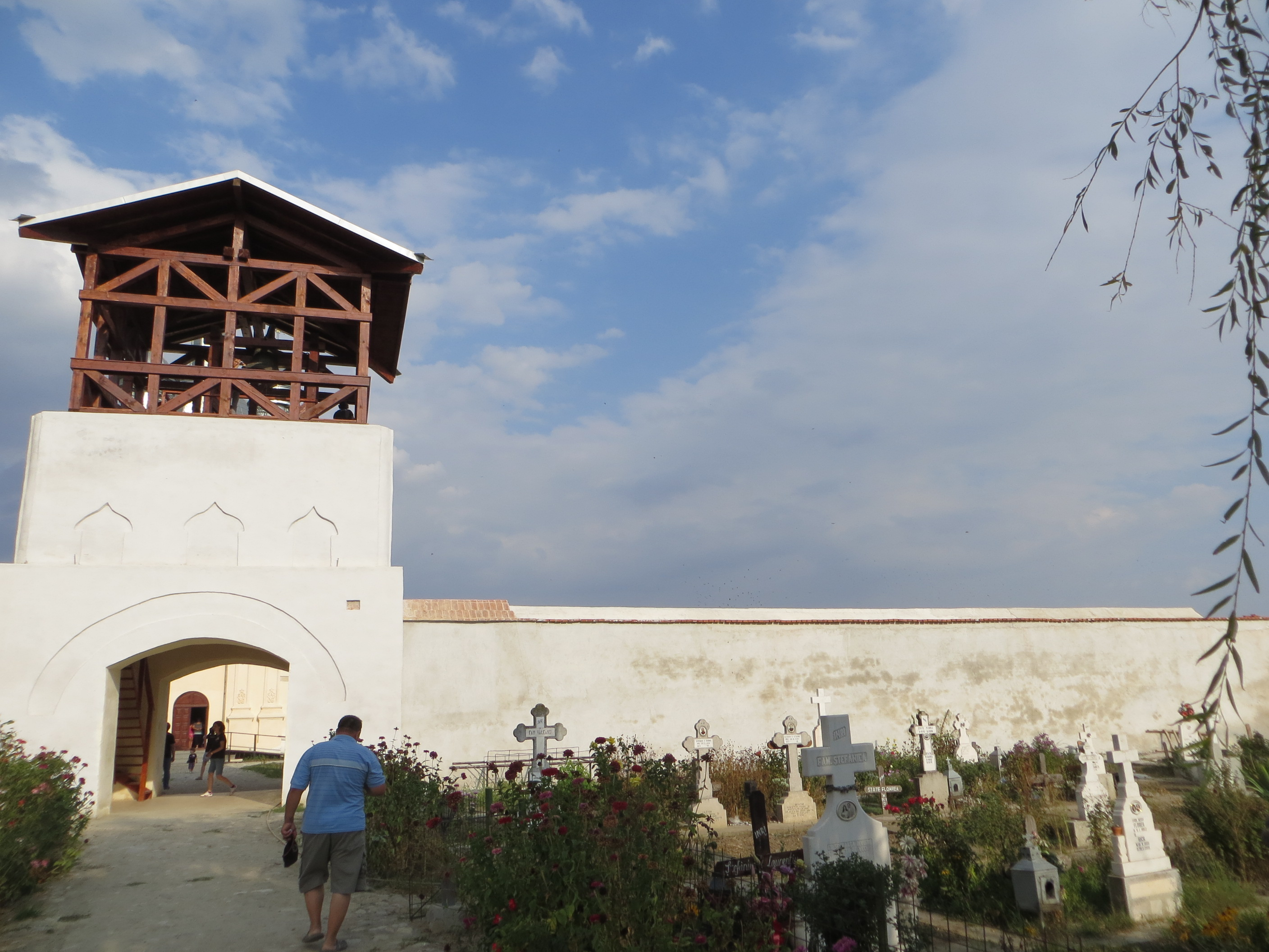 Zid de incintă 03